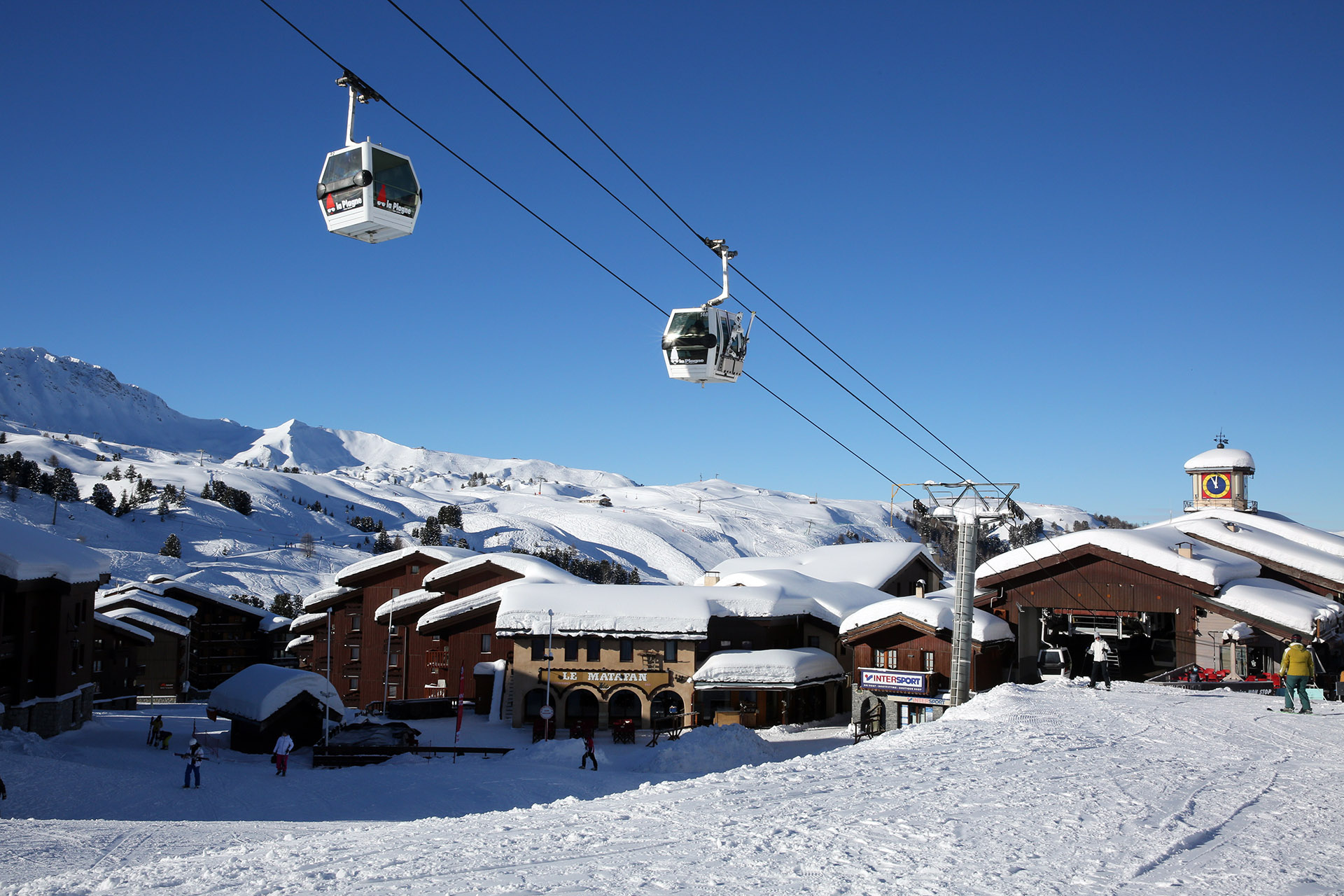 Belle Plagne